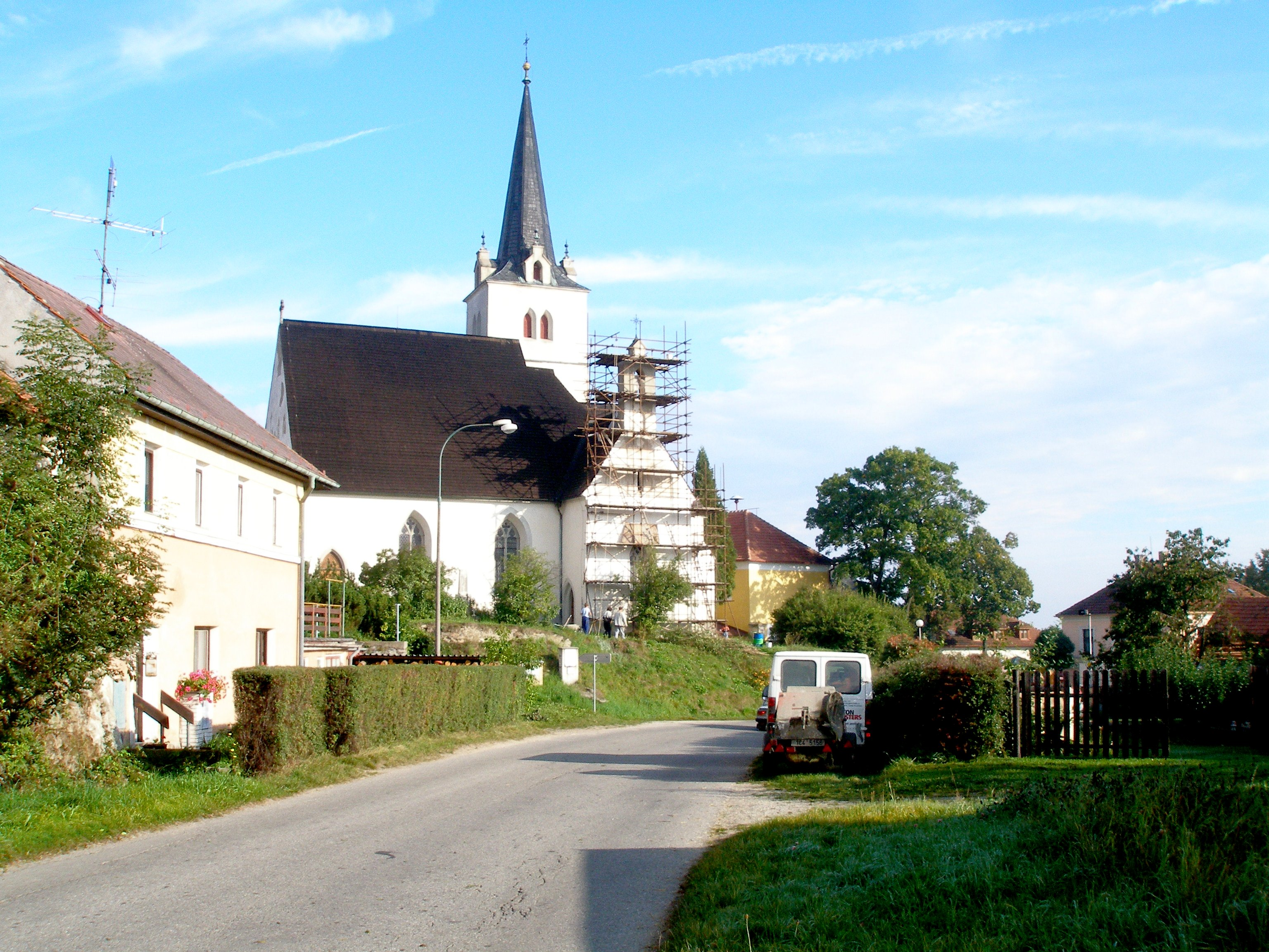 Kostel sv. Vavřince v Přídolí (Priethalu)